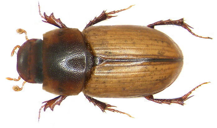 Familie: Scarabaeidae Grösse: 5-6 mm Fundort: Türkei, Marmaris, Hisarönü leg. U.Schmidt, 1997; det. Rößner Foto: U.Schmidt, 2006